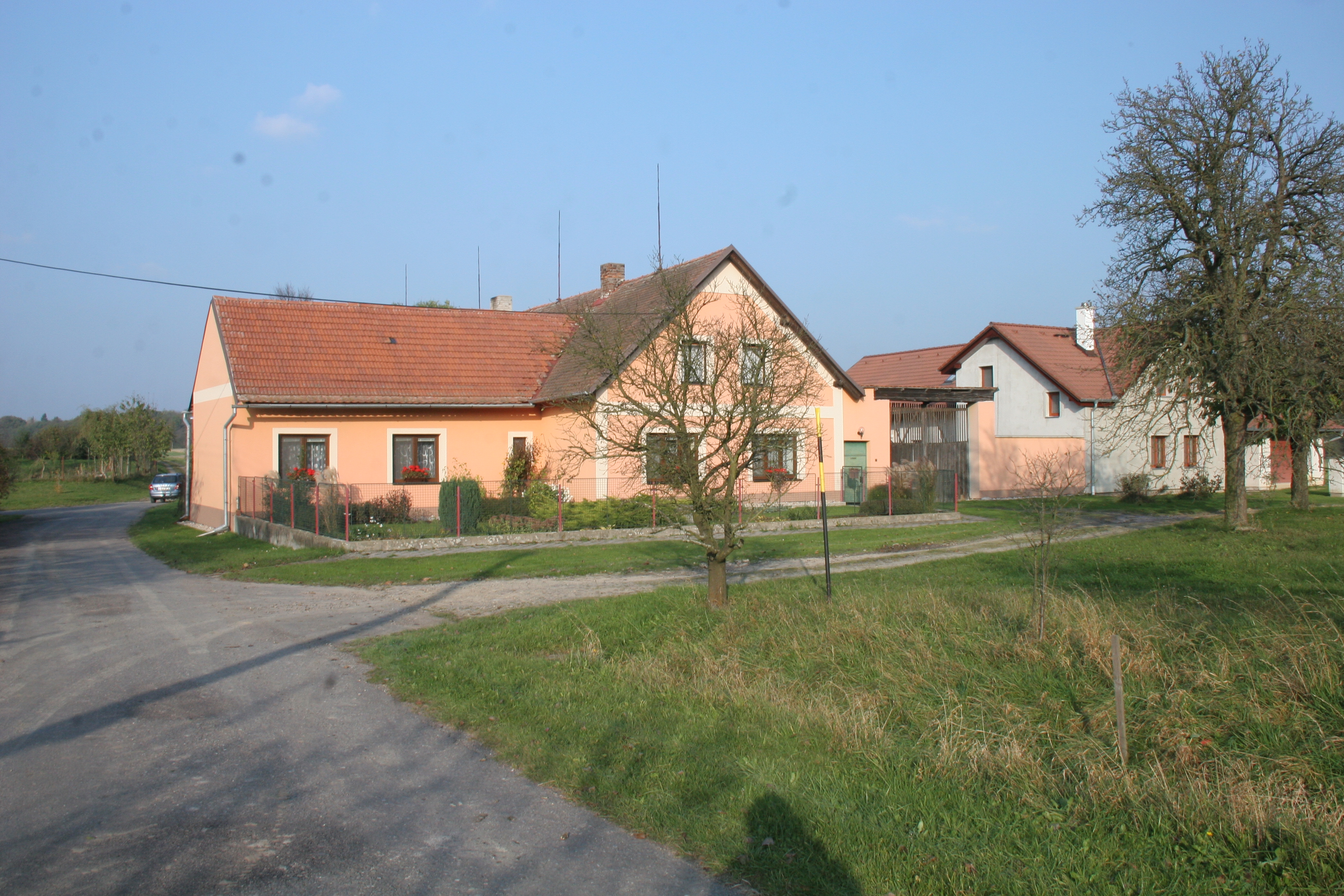 Žíka čp. 16